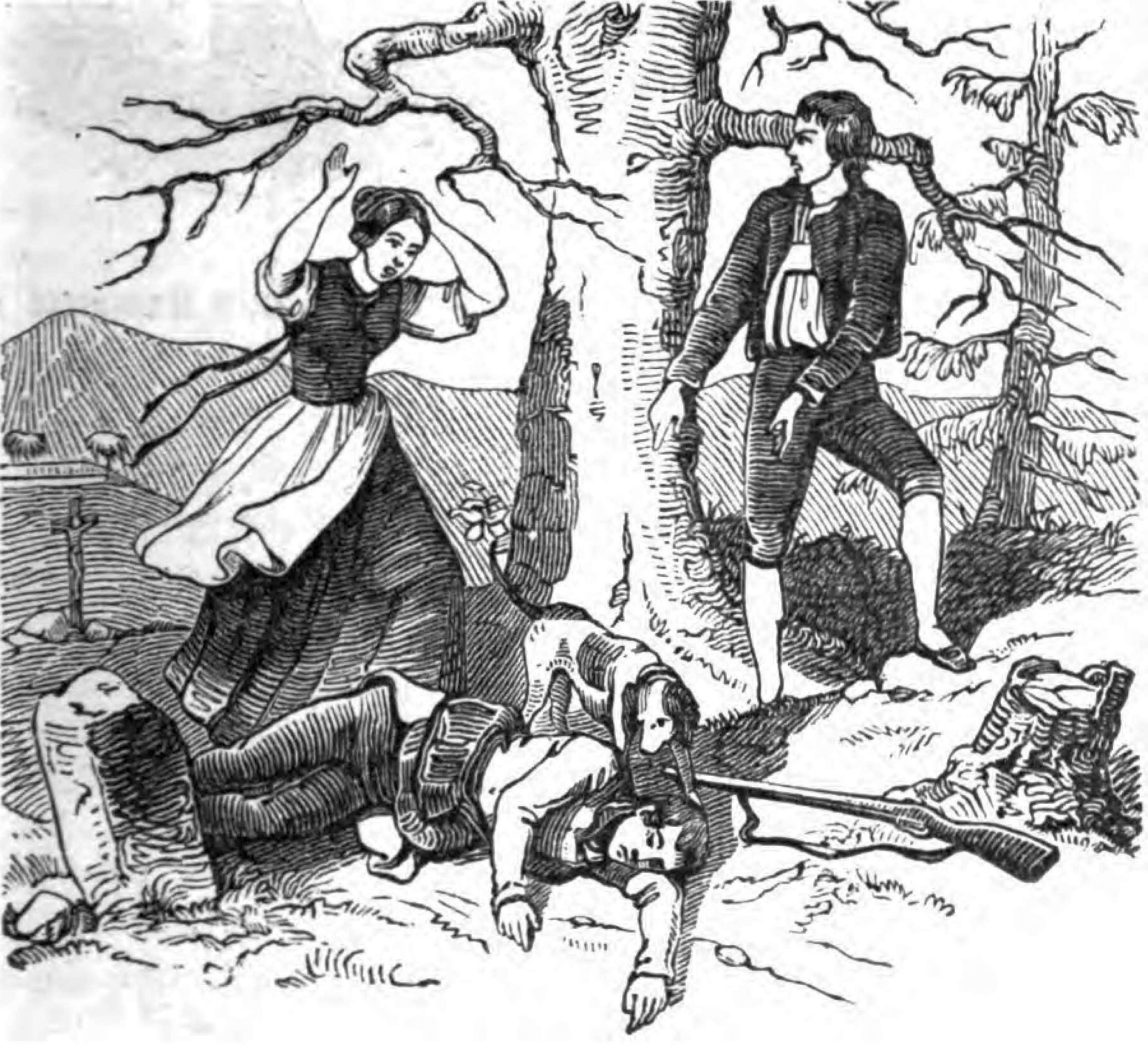 Berthold Auerbach, Schwarzwälder Dorfgeschichten, Tonele mit der gebissenen Wange, Zeichnung von Mathias Artaria, 1848. – „Da! da!“ rief der Sepper, „da liegt dein Jäger, jetzt heirath’ ihn.“